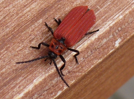 Dictyoptera aurora